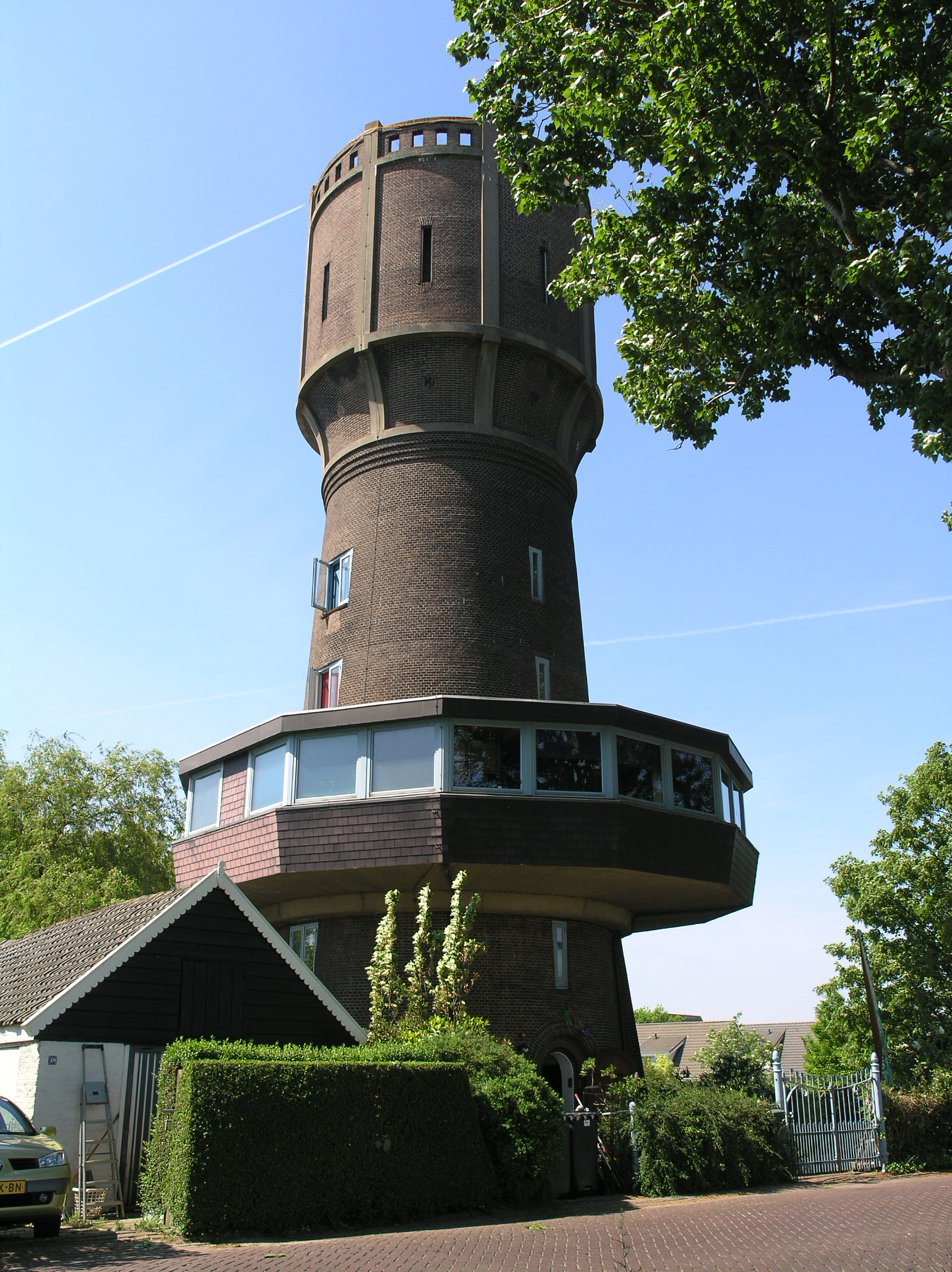 Strijen Watertoren